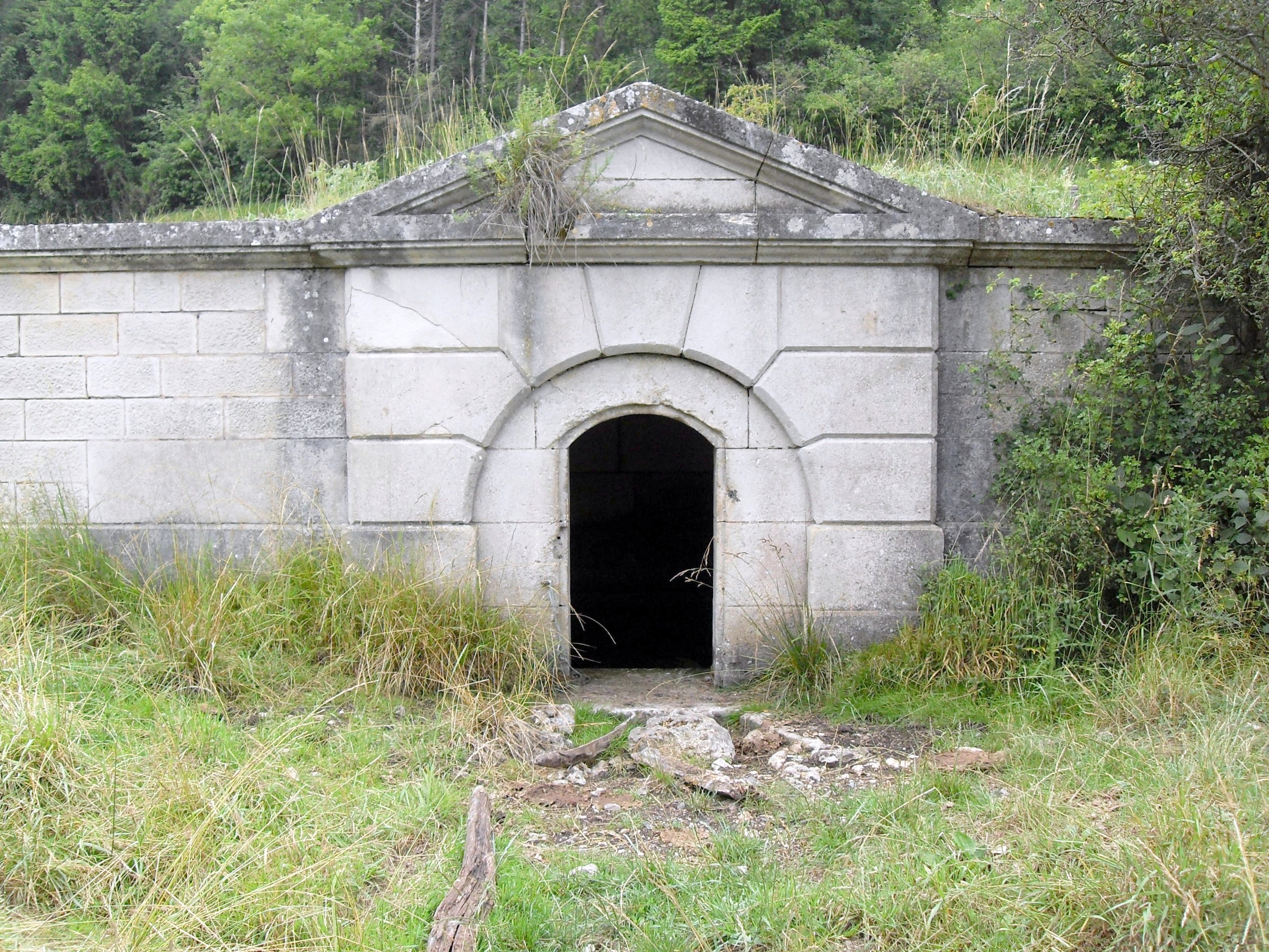 Pagny-sur-Meuse Meuse (55) - Le captage de la source des Trois-Fontaines sous le Bois-Juré, dans le Val de l'Asne. L'eau y est toujours très fraîche. Elle rejoint le ruisseau des marais qui se jette dans la Meuse.